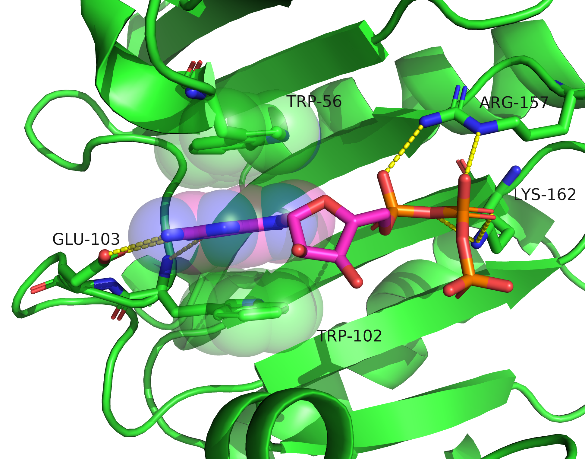 Mode of cap recognition of Eukaryotic translation initiation factor 4E, eIF4E in green, 7-METHYL-GUANOSINE-5'-TRIPHOSPHATE in magenta, labelled amino acids make contact with cap structure: transparent balls show stacking interaction, dashed lines hydrogen bonds. Water molecules not shown. Based on PDBID: 1L8B, rendered by PyMol